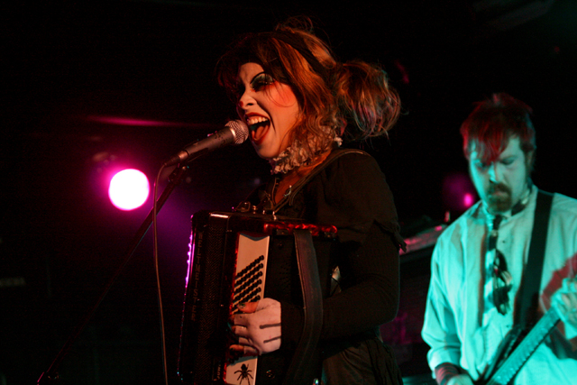 IMG_4044StolenBabies